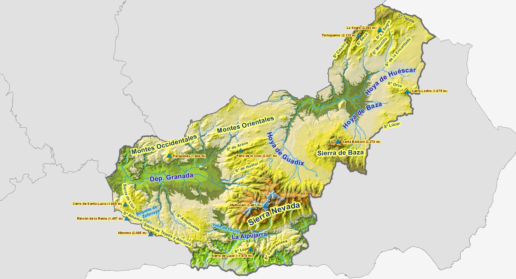 Mapa del relieve de la provincia de Granada